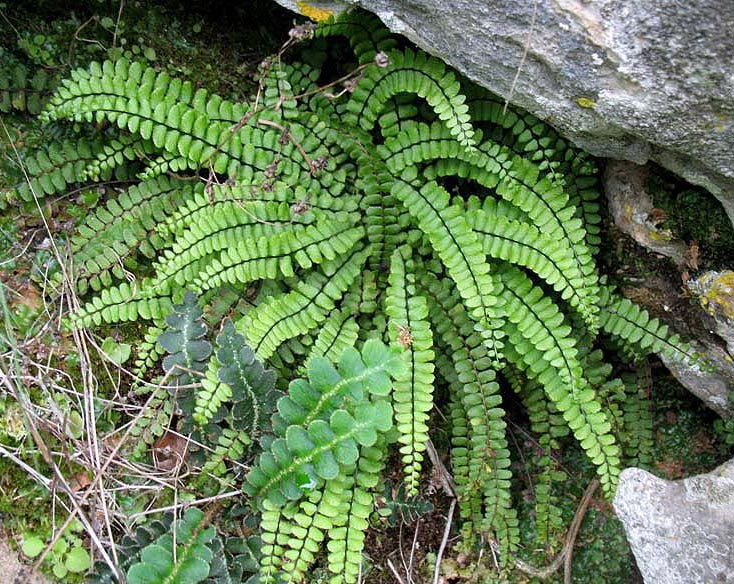 Falguera de Grazalema